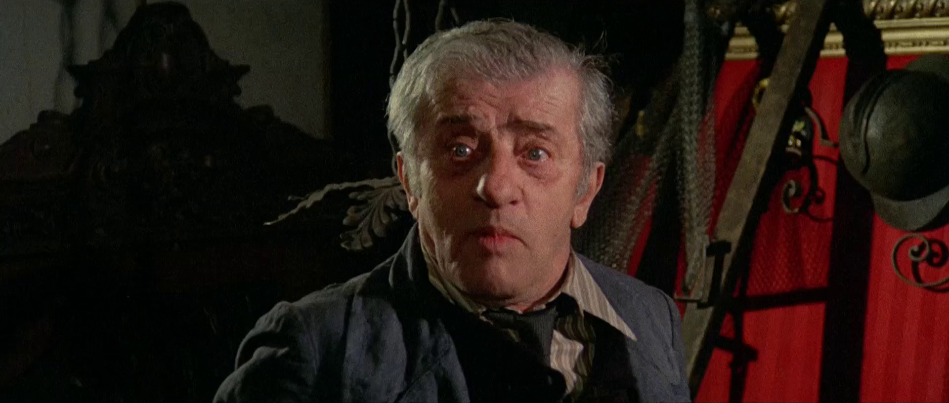 Scena dal film Milano odia: la polizia non può sparare (1974)